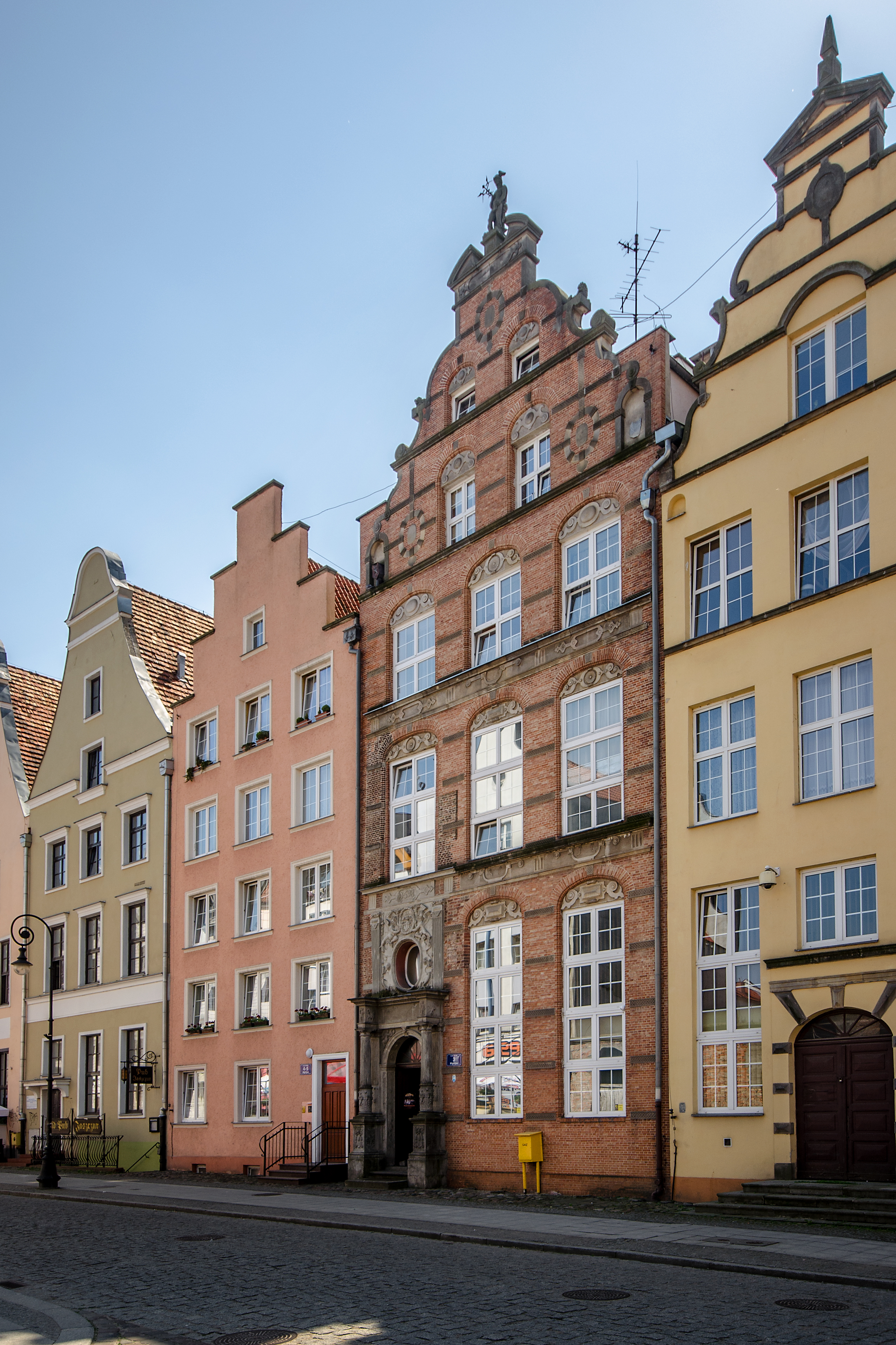 Elbląg, elewacja północna kamienicy